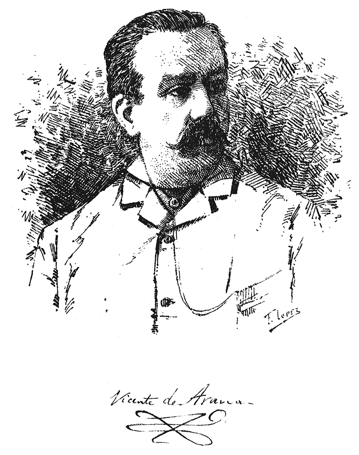 Vicente Aranaren erretratua. Egilea: Francisco López Alén. Euskal-Erria : revista bascongada San Sebastián T. 22 (1o sem. 1890), p. 124